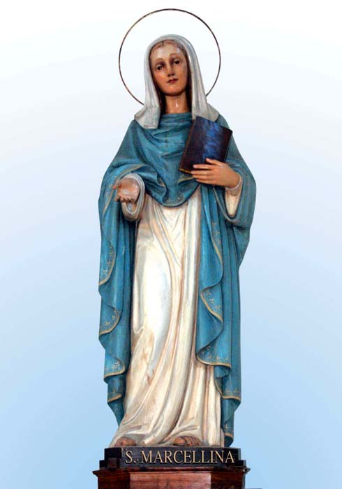 Santa Marcelina